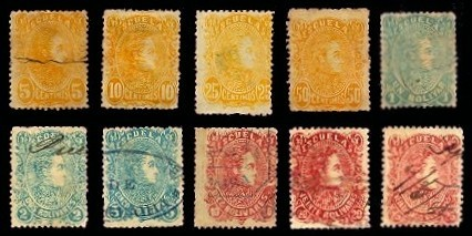 Estampilla fisco -postal efigie de Simón Bolívar año 1880, estampillas escuelas sin resello y perforacion 11 y 11 1/2. Nª de catálogo * según Aurelio Blanco: 25/34 Blanco, Aurelio. 2009: Venezuela Catálogo especializado de estampillas. Caracas. 183p. ISBN 980-300-176-0 Numero de estampillas diferentes 10 Valor de 5 céntimos 13780 piezas de color amarillo Nº 25 Valor de 10 céntimos 800000 piezas de color amarillo Nº 26 Valor de 25 céntimos 1200000 piezas de color amarillo Nº 27 Valor de 50 céntimos 660000 piezas de color amarillo Nº 28 Valor de 1 Bolívar 500000 piezas de color azul Nº 29 Valor de 2 Bolívares 200000 piezas de color azul Nº 30 Valor de 5 Bolívares 100000 piezas de color azul Nº 31 Valor de 10 Bolívares 50000 piezas de color rojo Nº 32 Valor de 20 Bolívares 30000 piezas de color rojo Nº 33 Valor de 25 Bolívares 20000 piezas de color rojo Nº 34